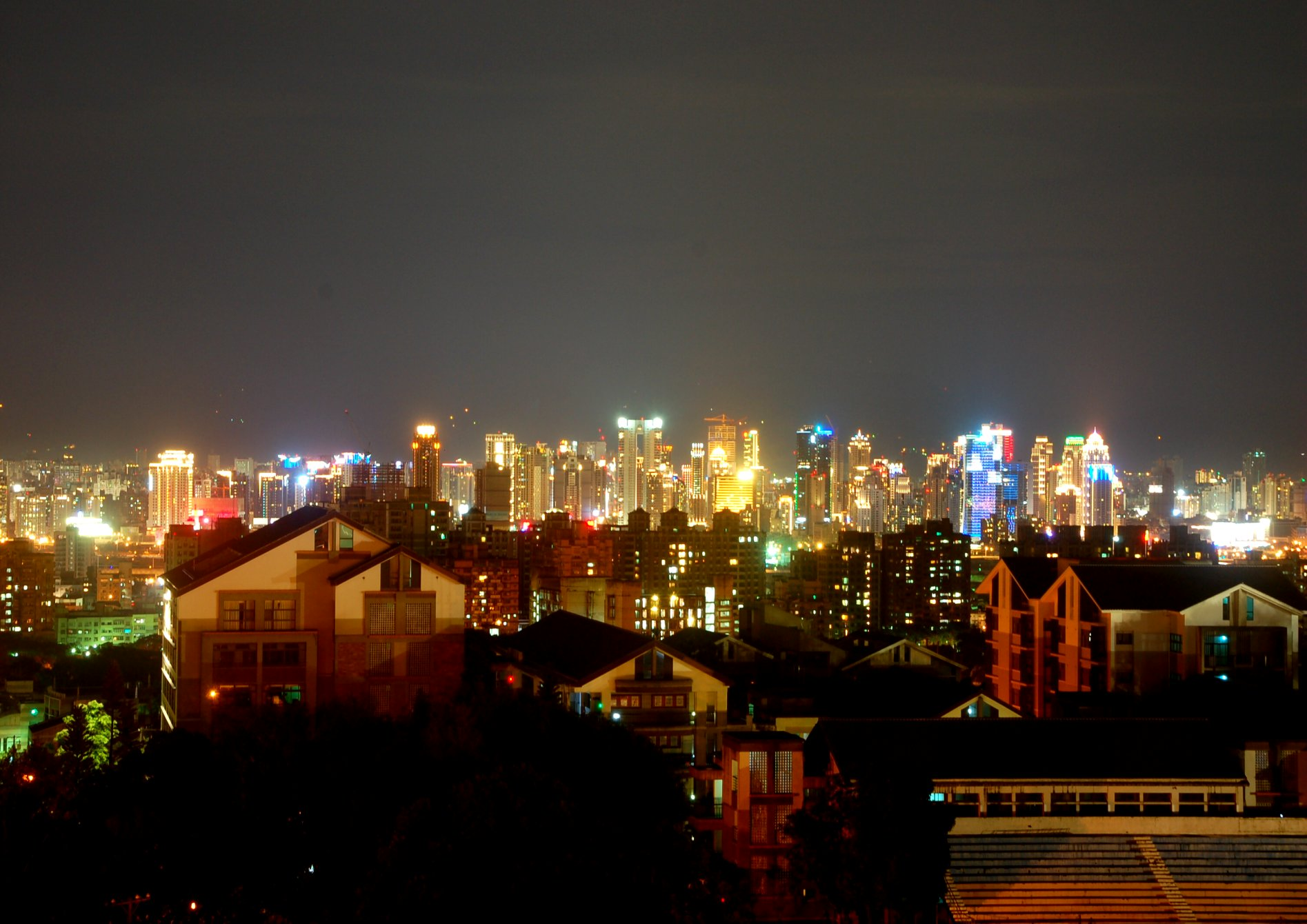 中文（台灣）: 台中七期重劃區